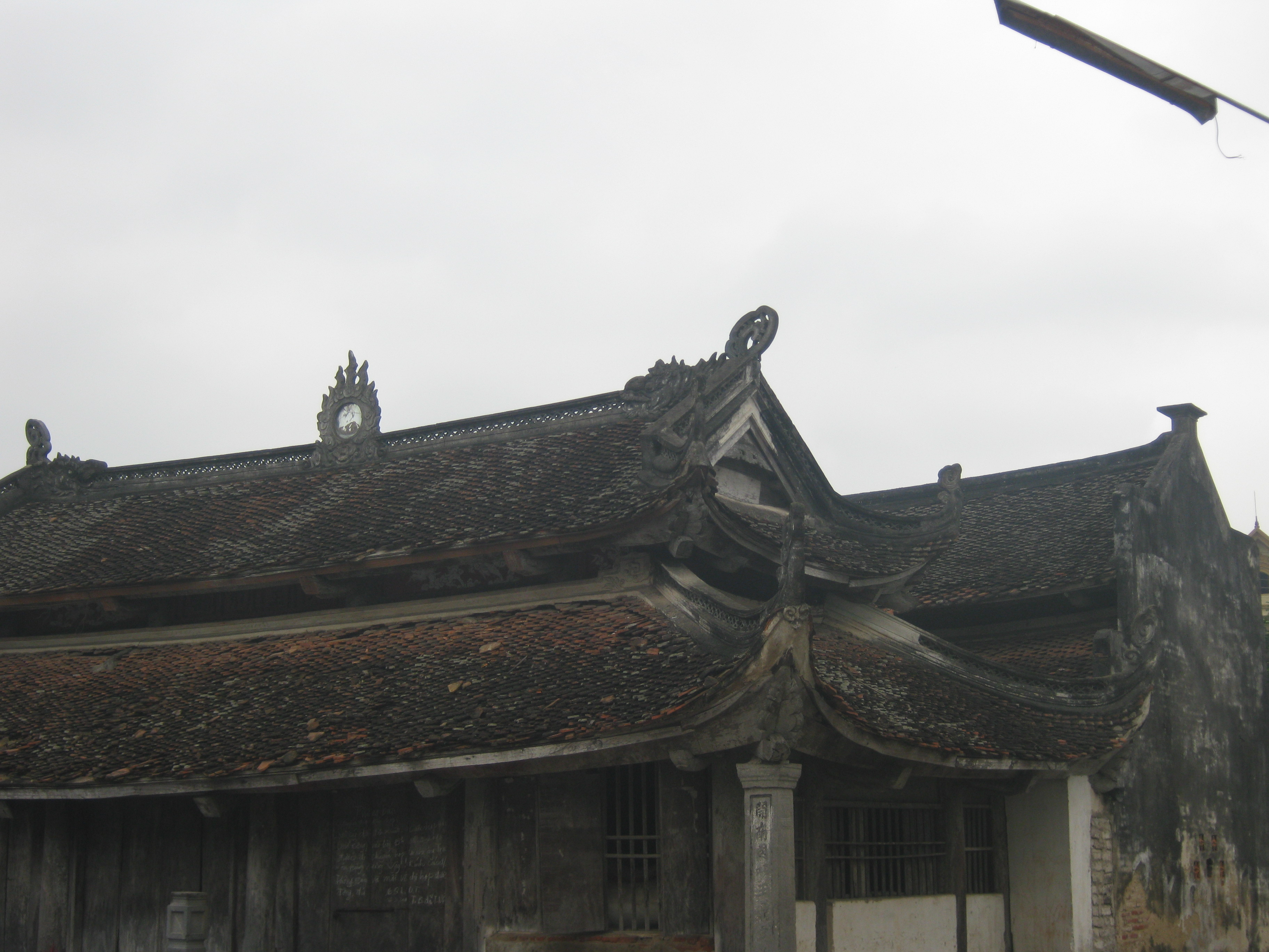 Quần thể di tích đền thờ vua Đinh Tiên Hoàng ở Nam Định